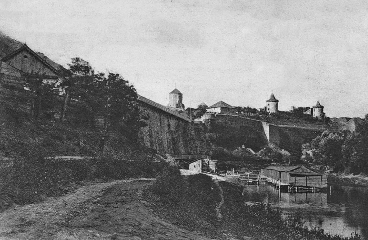 Річка Смотрич під мурами Кам'янець-Подільської фортеці